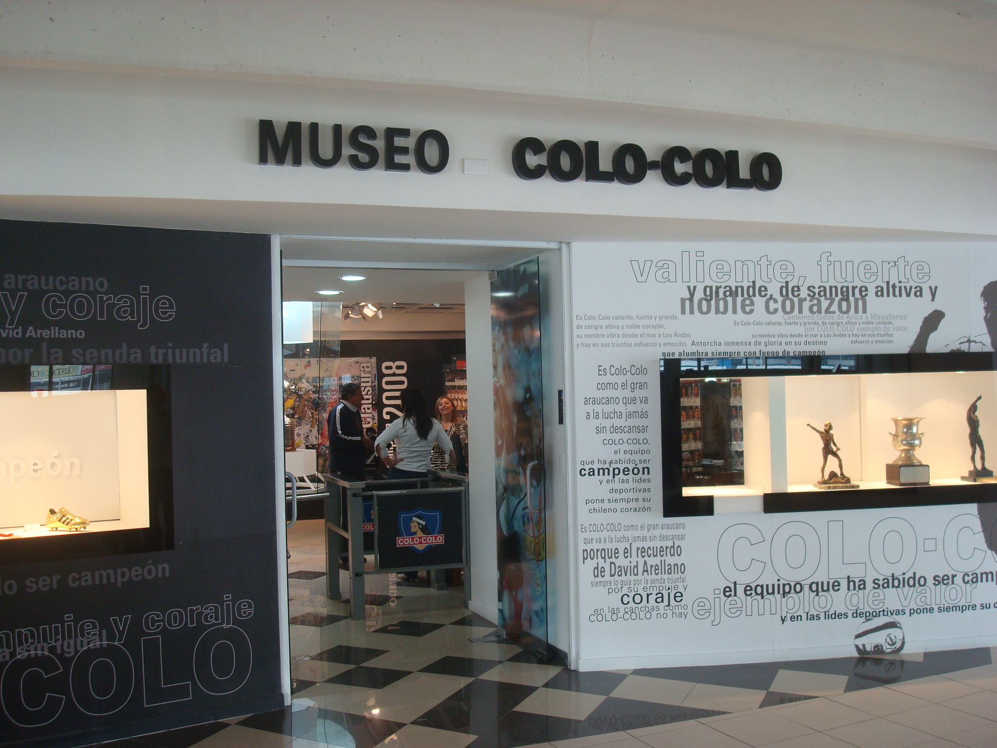 Museo de Colo-Colo, Estadio Monumental